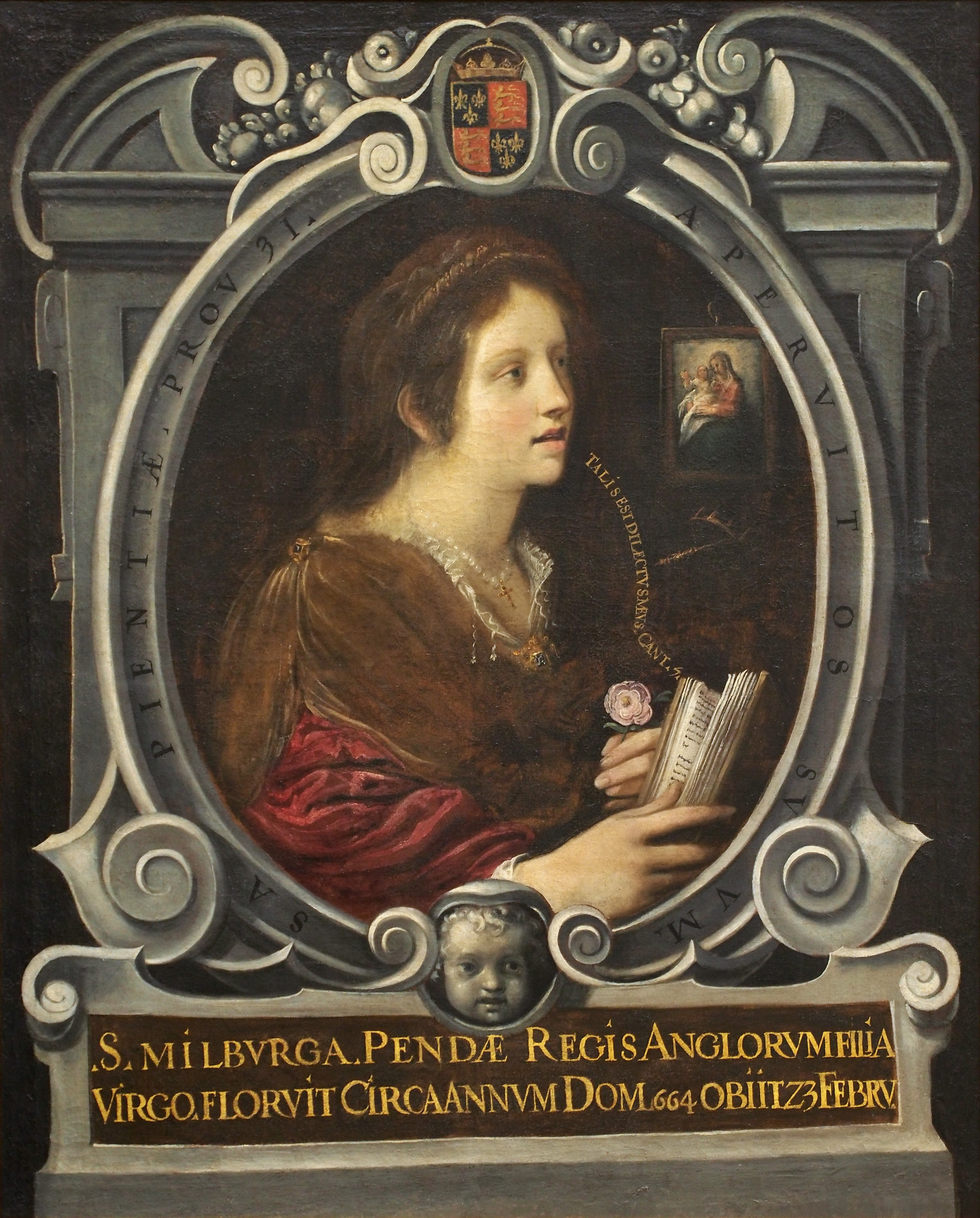 Santa Milburga. Obra de Juan de Roelas, c. 1605. Iglesia de San Miguel and San Julián, Valladolid.